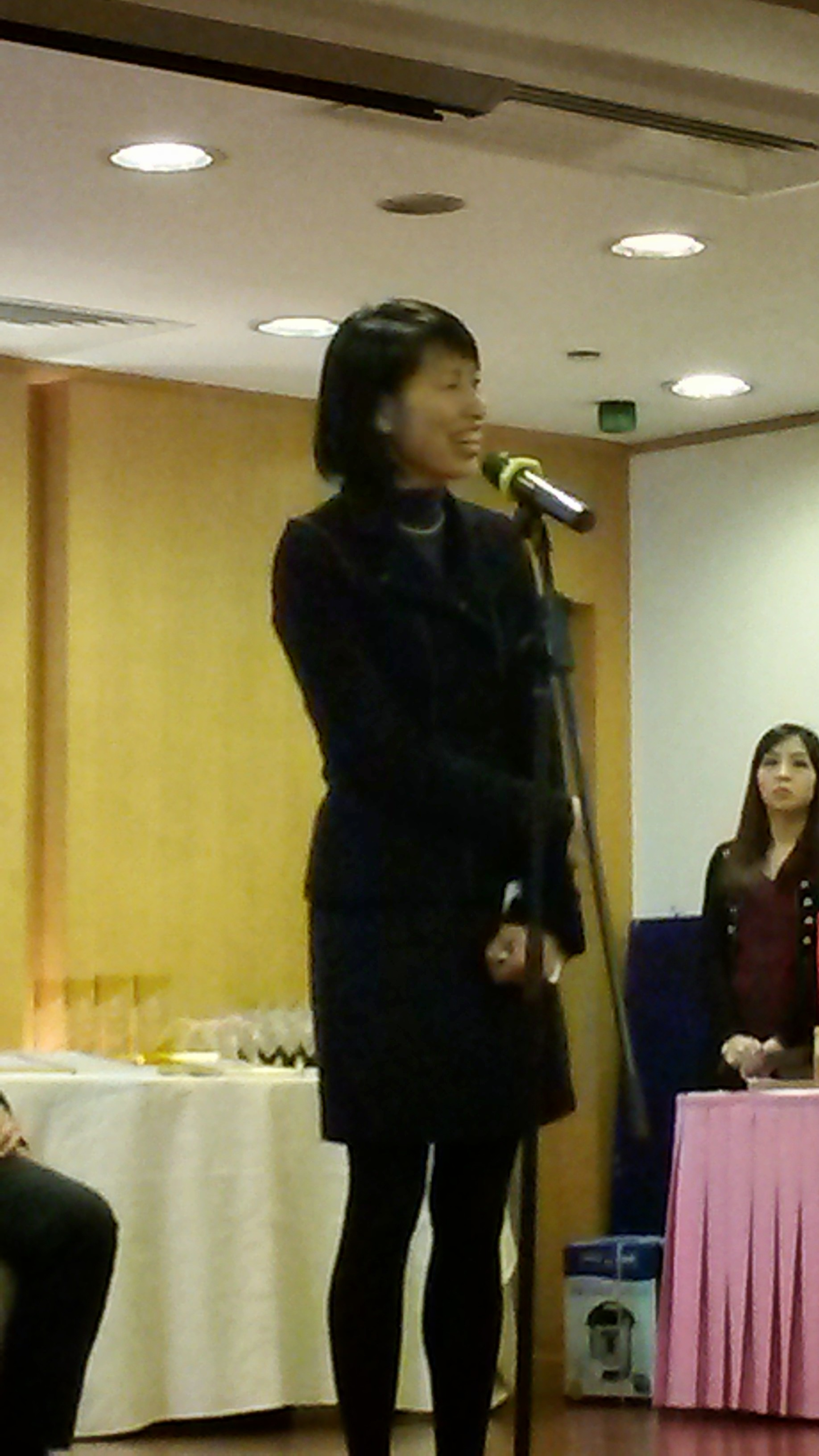 社會福利署署長葉文娟